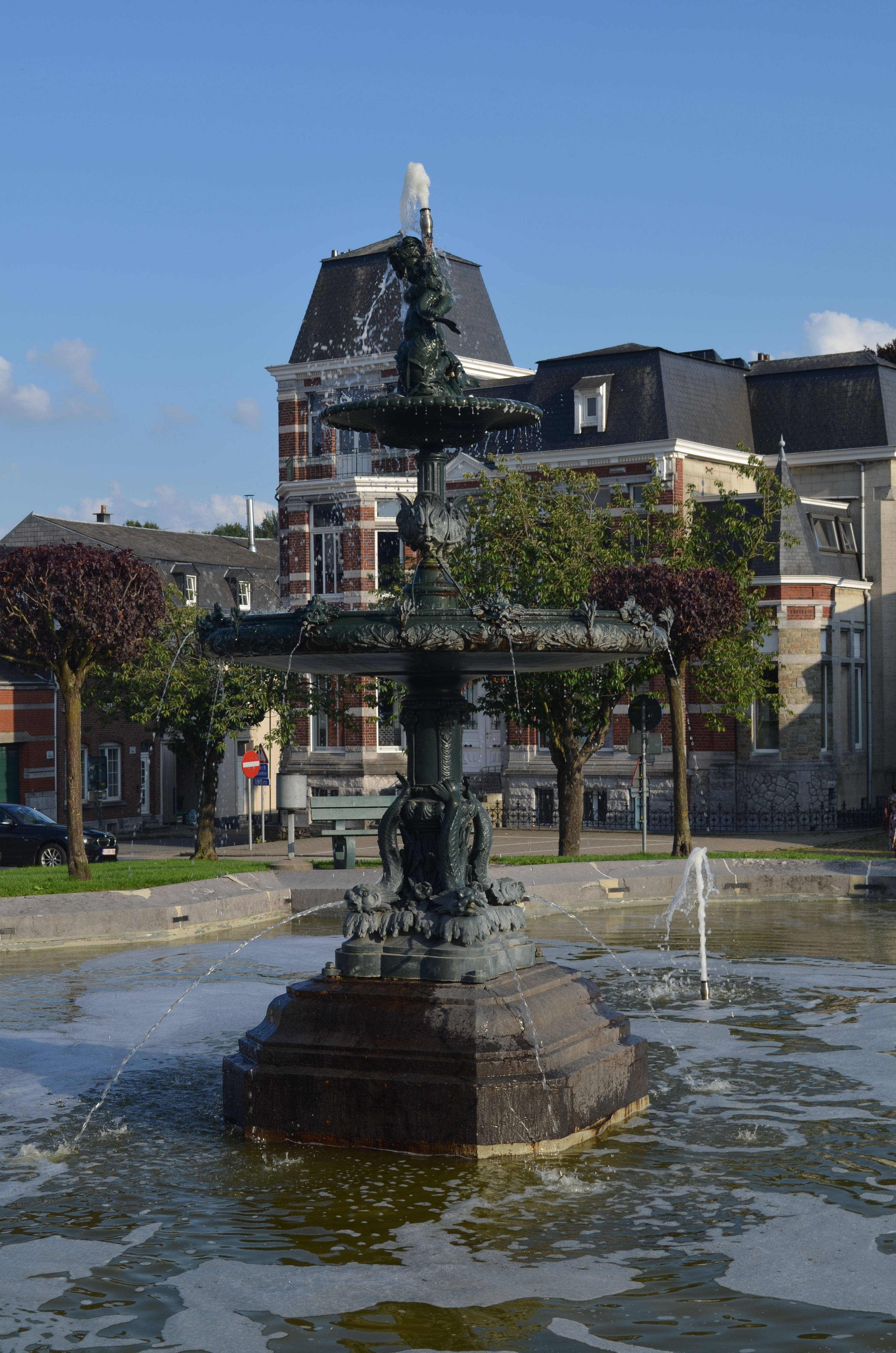 Montzen (Belgique) - place Communale